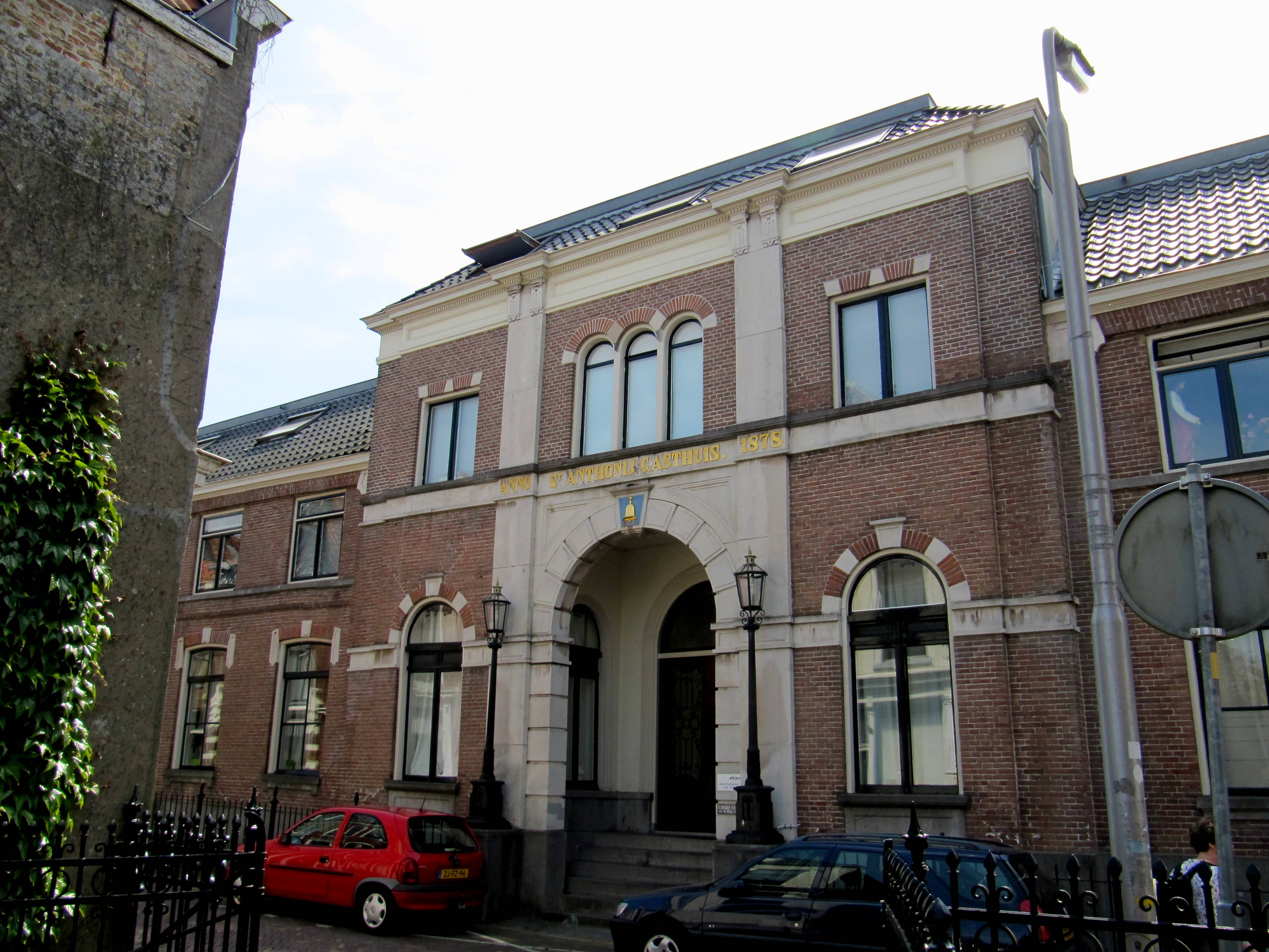 GASTHUISCOMPLEX. Het zogenoemd Sint Anthony Gasthuis, ontstaan in 1878 in eclectische stijl naar ontwerp van architect Frederik Stoett. De aan de Grote Kerkstraat gelegen hoofdvleugel wordt benadrukt door een drie traveeën breed in hardsteen gevat overwelf ingangsportaal - waarboven het opschrift ANNO SINT ANTHONY GASTHUIS 1878 en een sluitsteen met vasthangende klok zonder gietersnaam of jaartal, diam. 40 cm., attribuut van Antonius Abt. Te weerszijden van de hoofdingang een gietijzeren lantaarnpaal met klassieke motieven, op hardstenen sokkel.